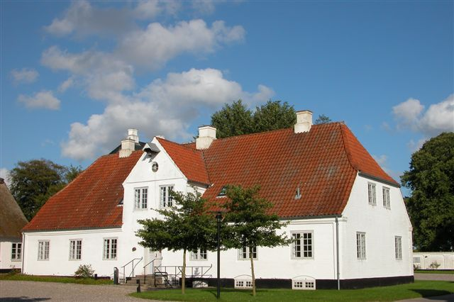 Sandbjerg Gods